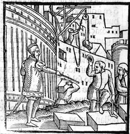 Рисунок из Хроники Перу, 1553